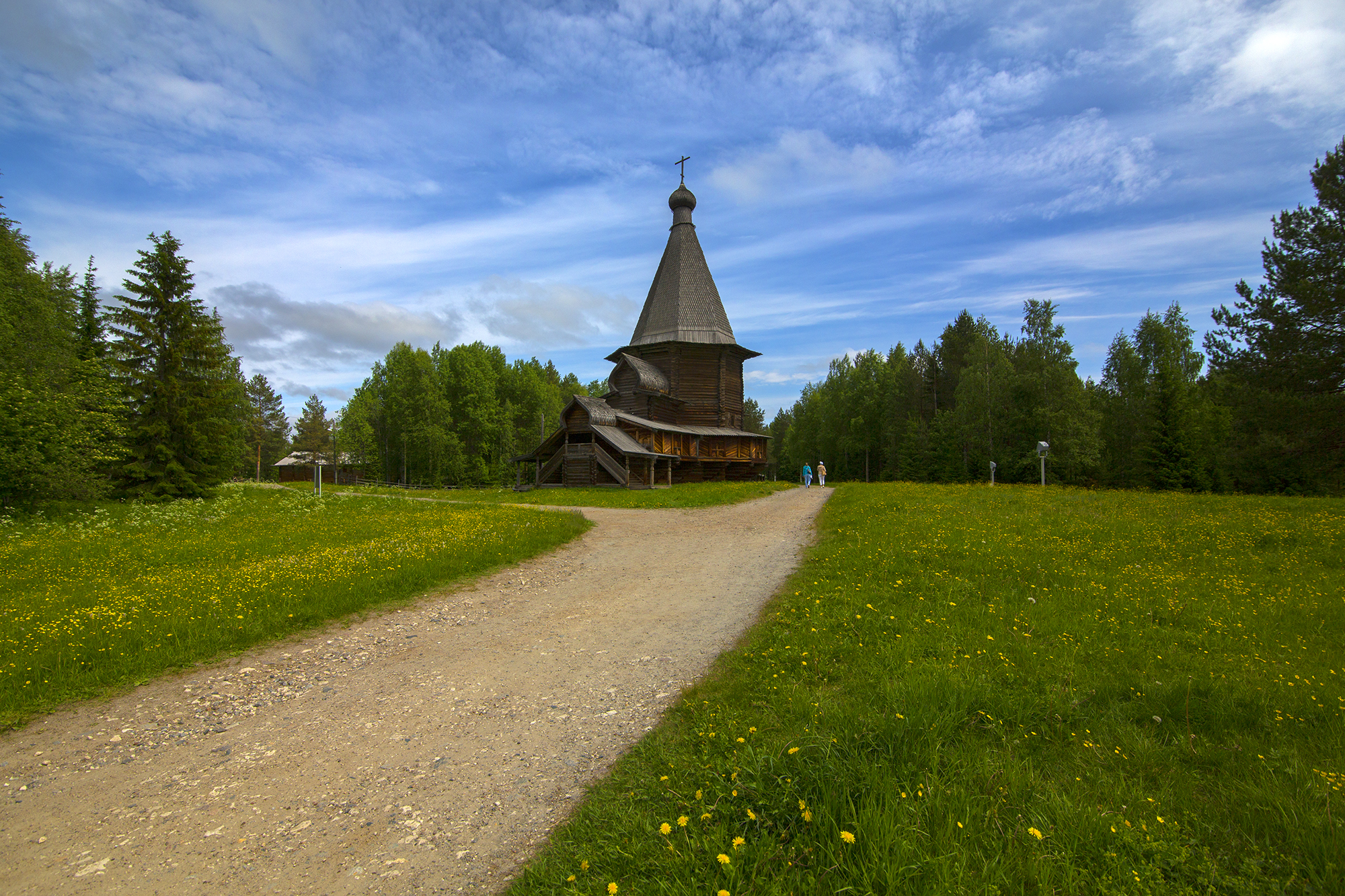 Церковь великомученика Георгия Победоносца из д.Вершина Верхнетоемского района: Малые Корелы, Приморский район, Архангельская область